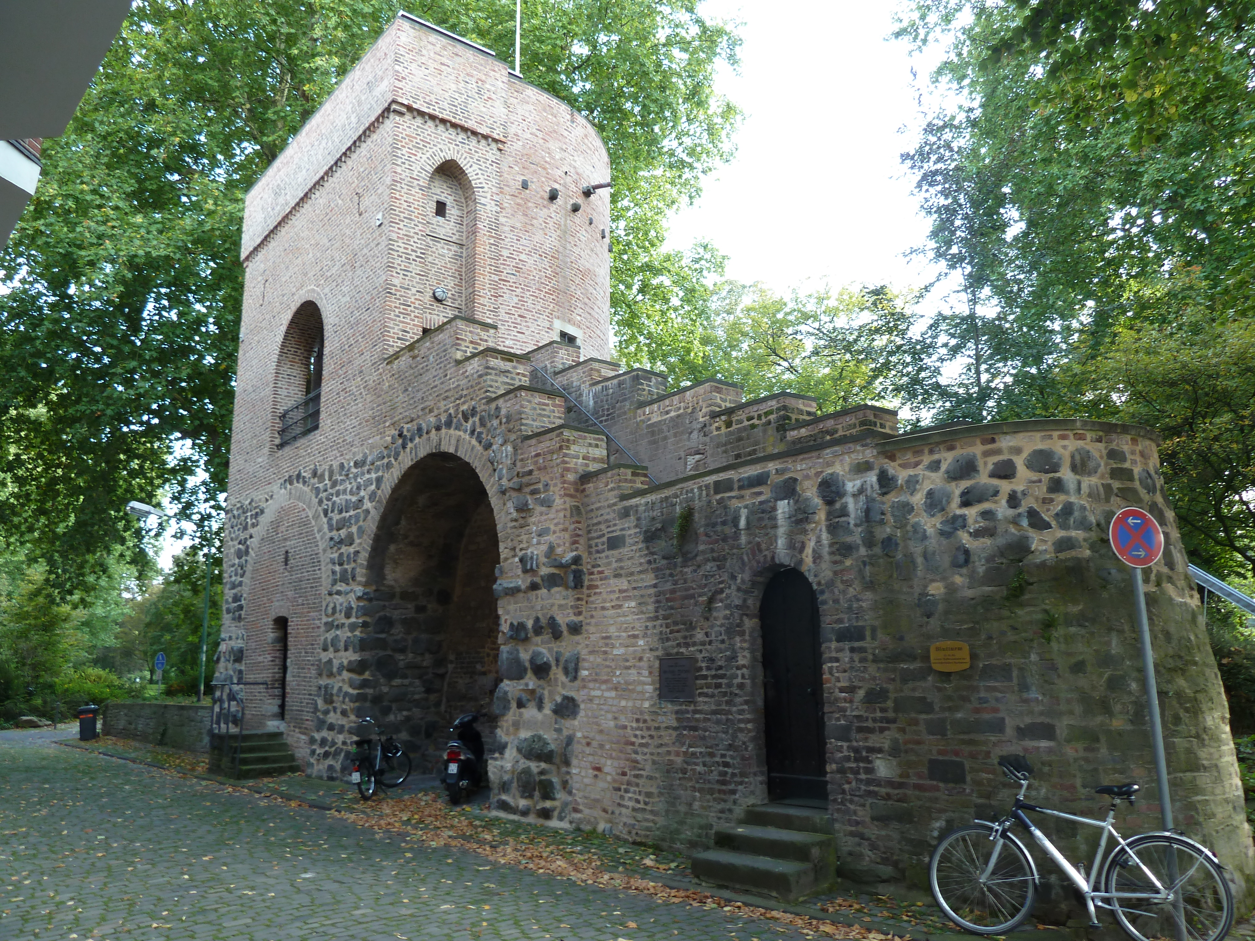 Ansicht von der Stadtseite; 13./15. Jahrhundert; Halbrundturm der mittelalterlichen Stadtmauer von Neuss